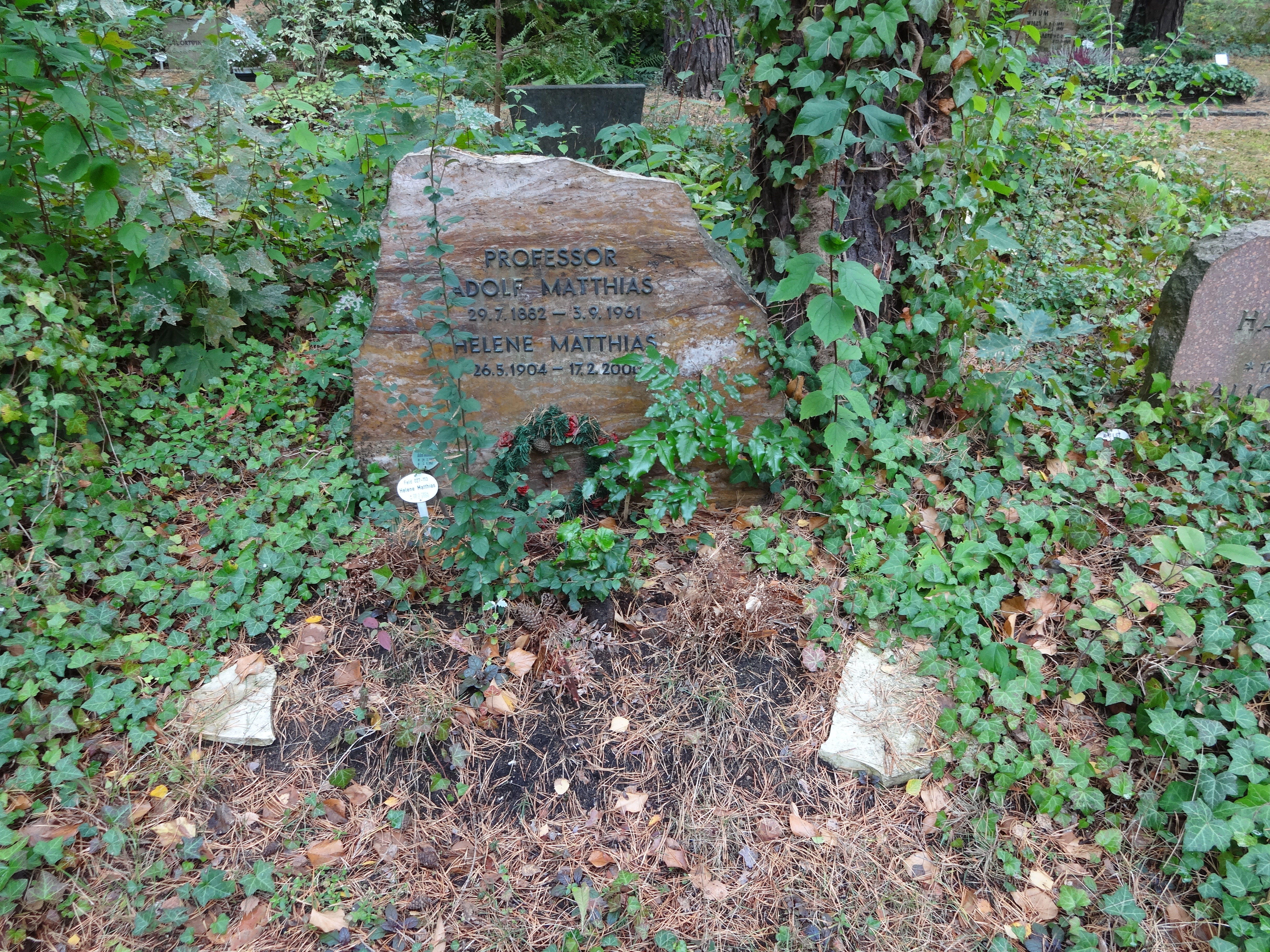 Grab von Prof. Adolf Matthias auf dem Waldfriedhof Zehlendorf